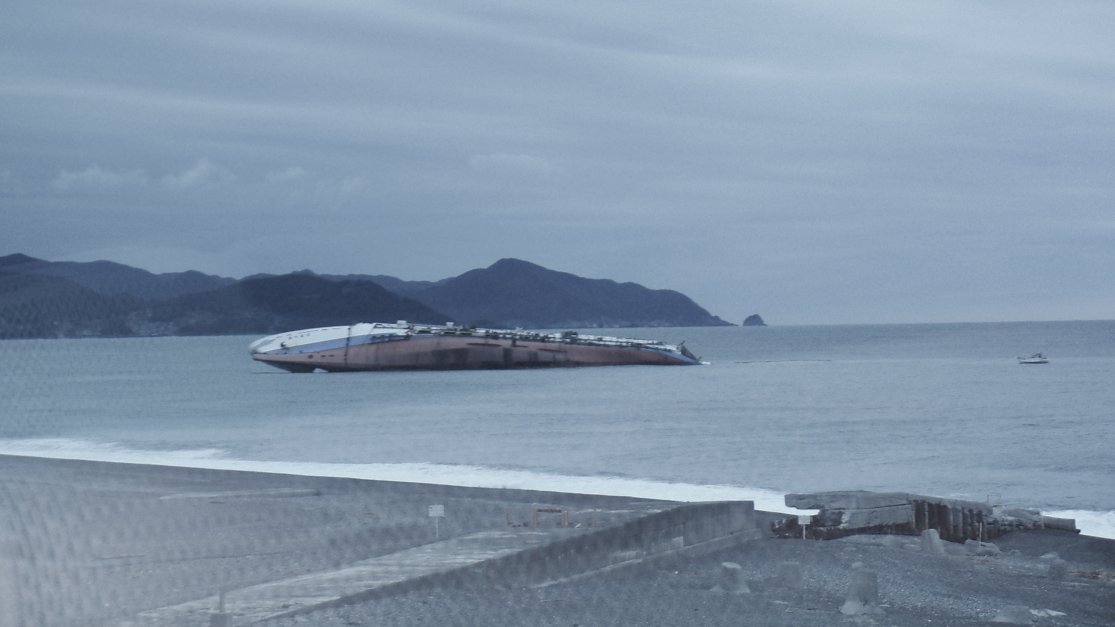 三重県御浜町の七里御浜に座礁したマルエーフェリーのフェリーありあけ、2010年2月にバスより撮影。